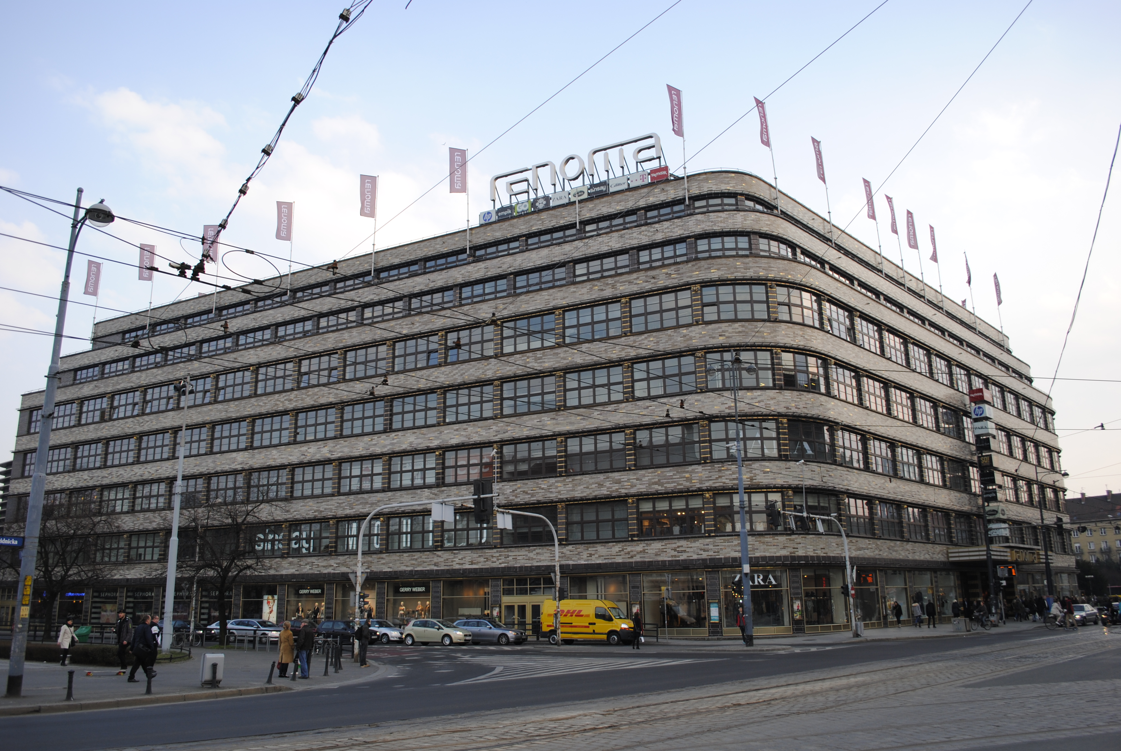 Ehemaliges Warenhaus Wertheim (heute:Renoma)